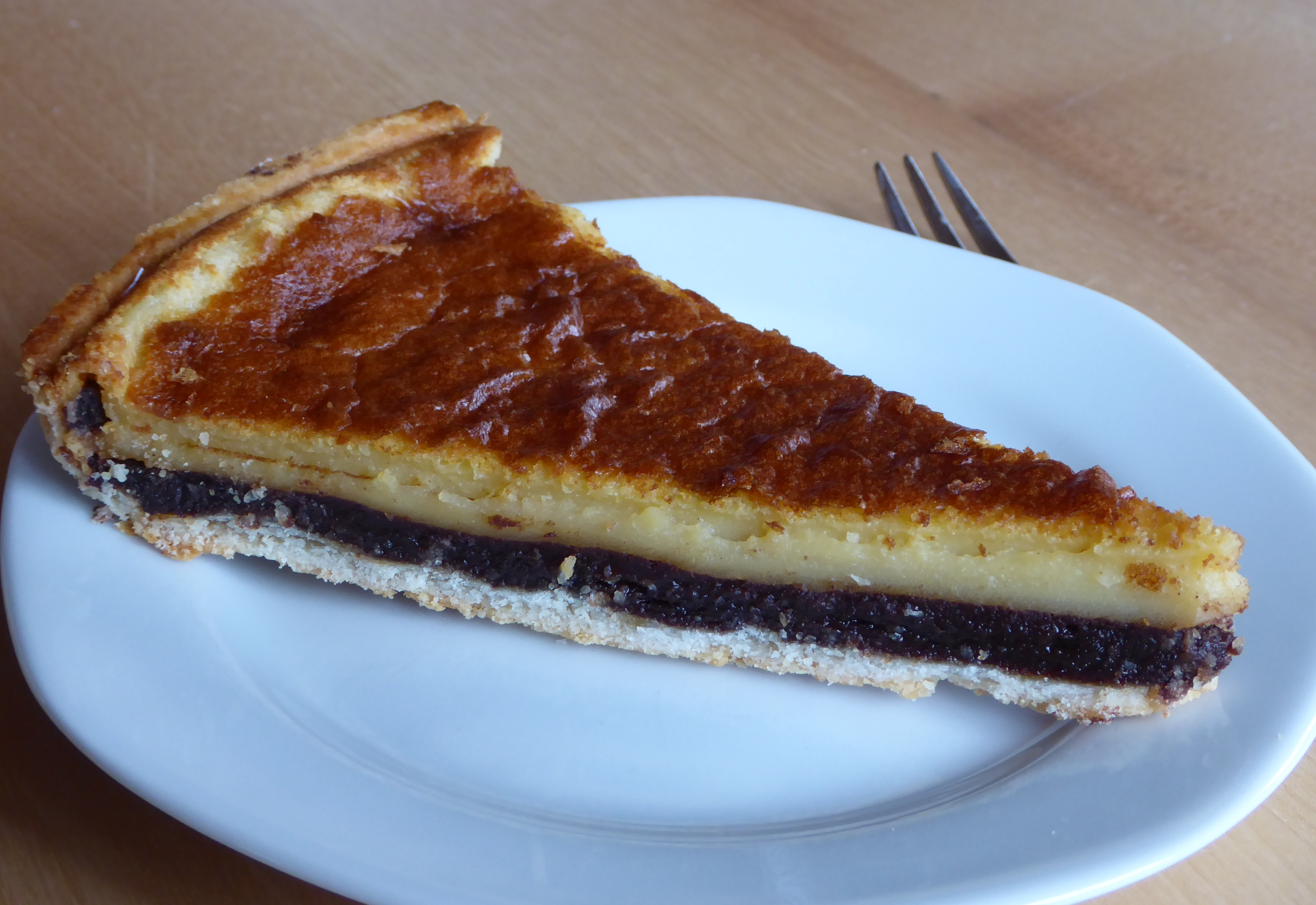 Ein Stück Schlorzifladen, hergestellt von einer Wattwiler Konditorei